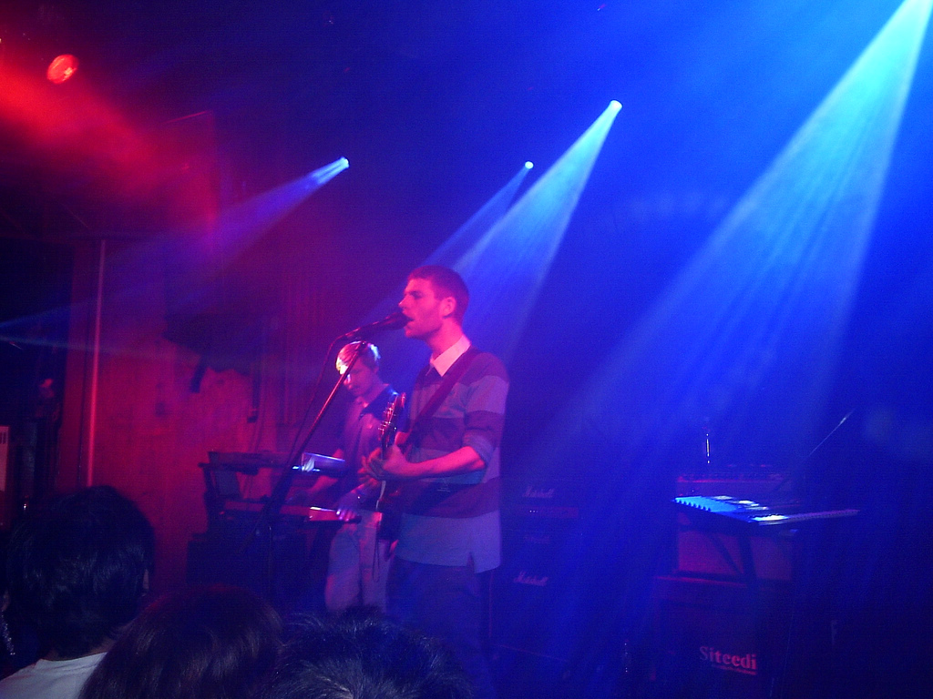 Foto: David Sánchez